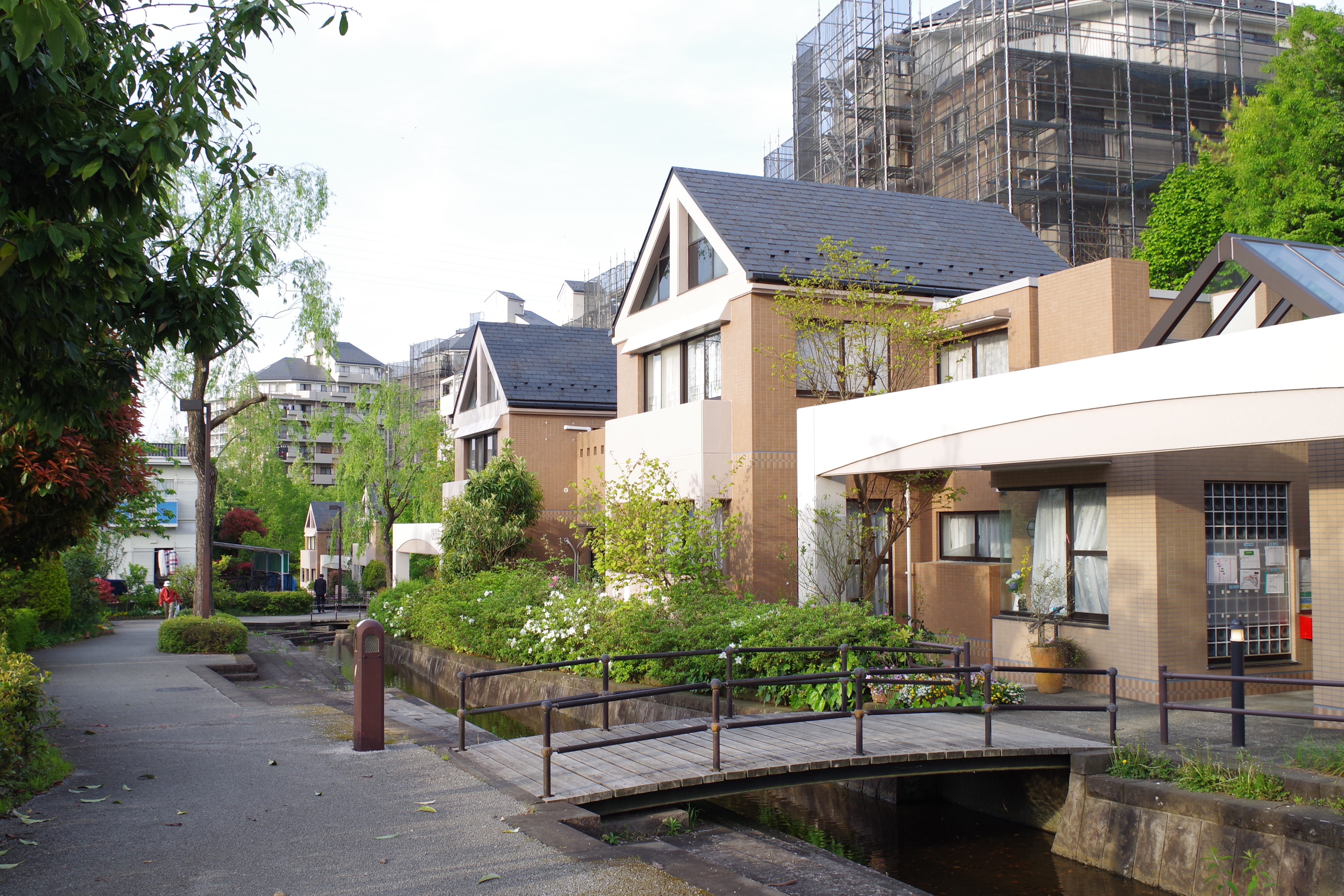 せせらぎ緑道と多摩NTノナ由木坂団地160426